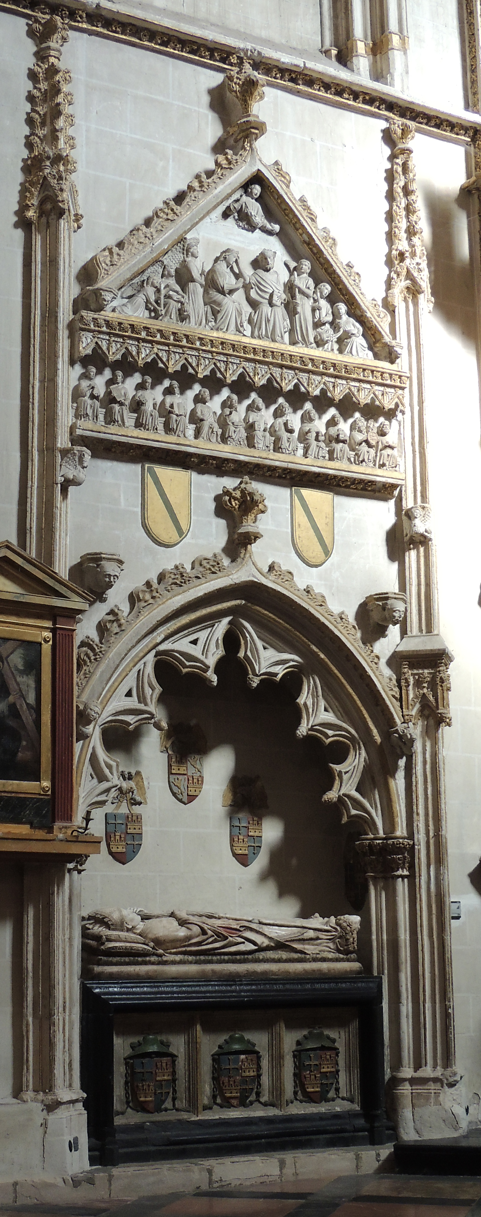 Sepulcro de Juan Martínez de Contreras († 1434), que fue arzobispo de Toledo, en la capilla de san Ildefonso de la catedral de Toledo, (España).